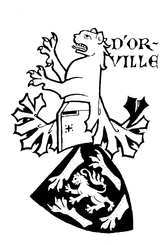 Stammwappen derer d'Orville, reformierte, aus Frankreich in die Reichsstadt Frankfurt eingewanderte Kaufmannsfamilie